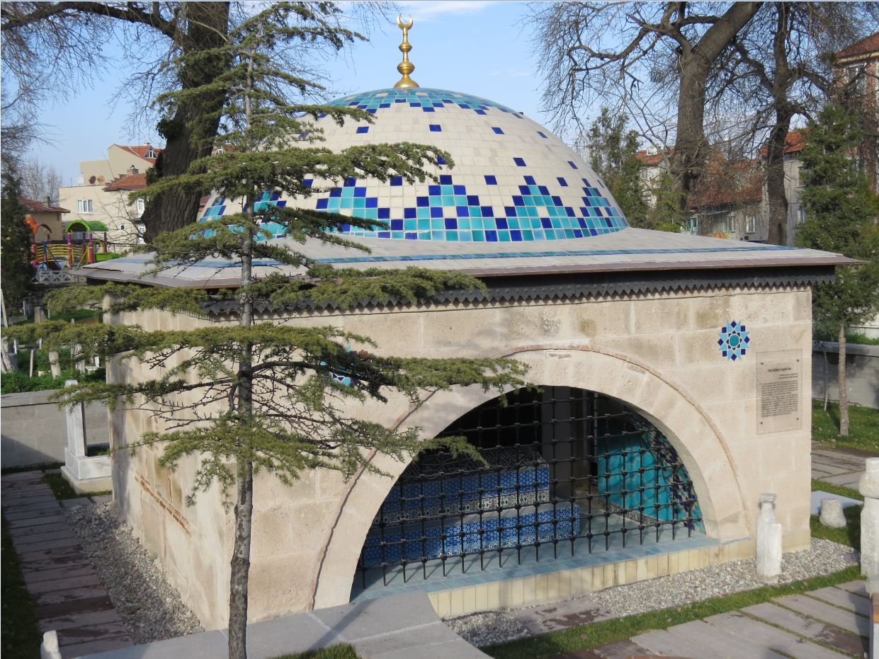 Sunullah Gaybi Türbesi